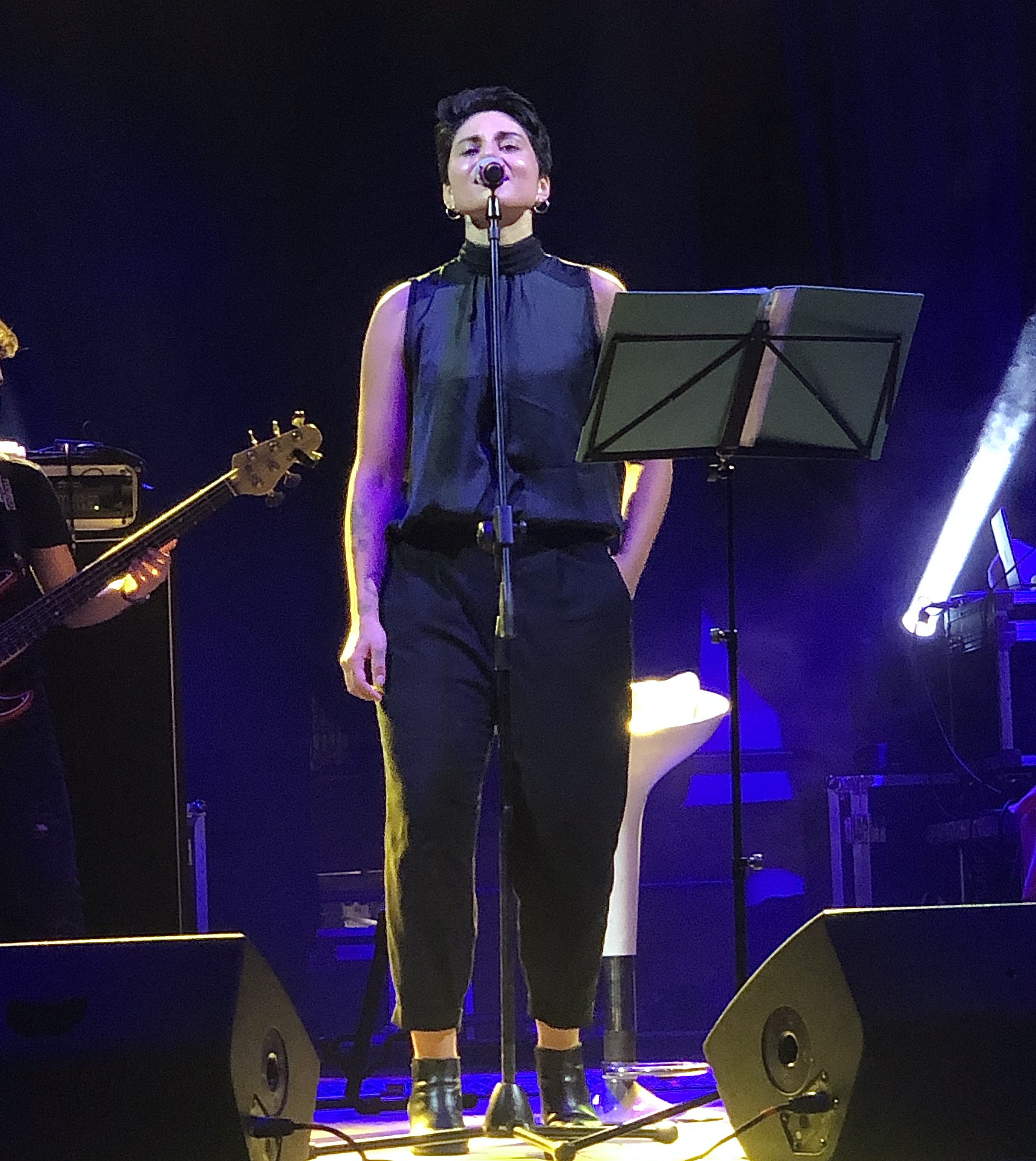 Giordana Angi a una tappa del Casa Tour